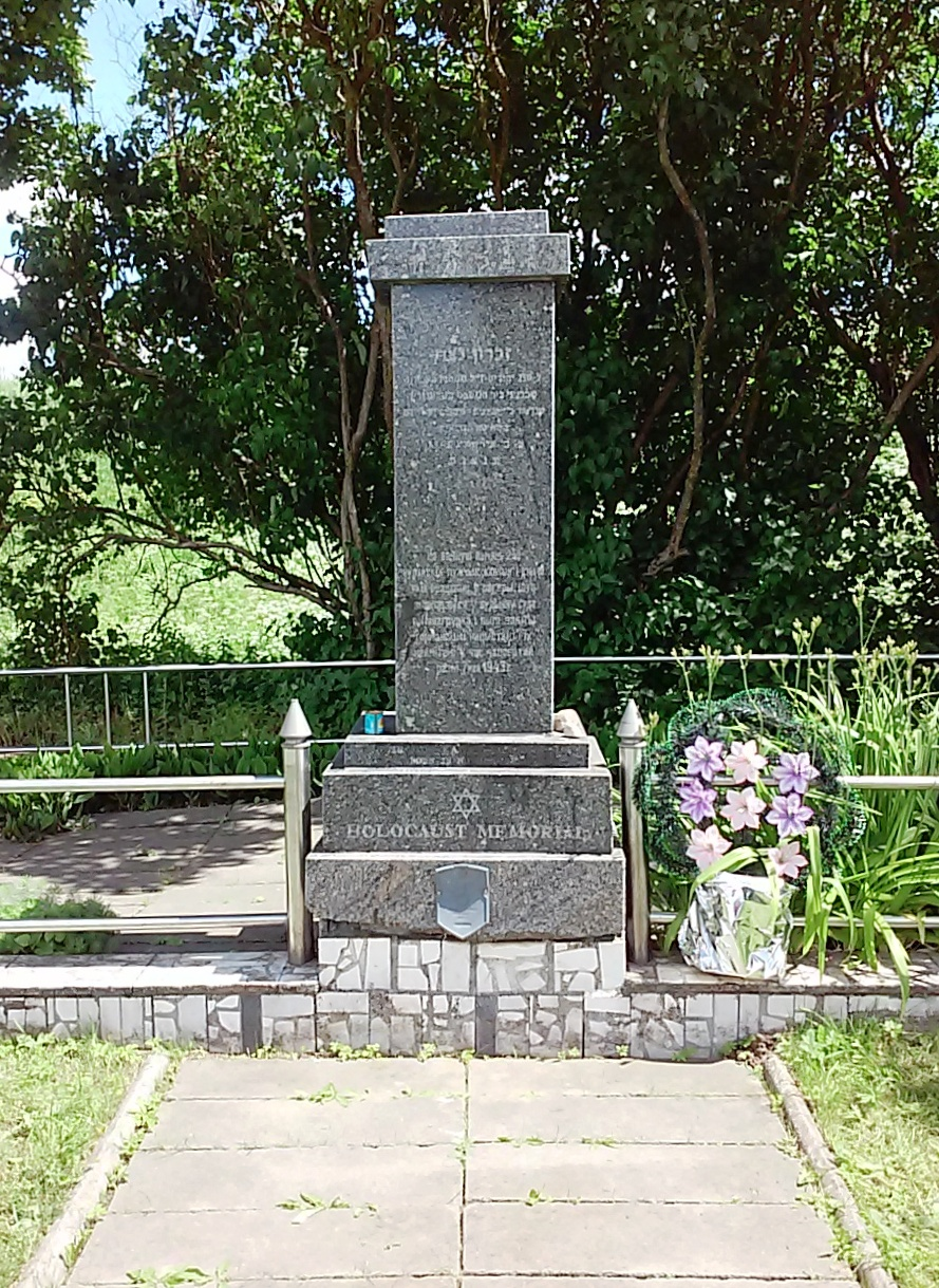 Новогрудок. Памятник в конце улицы Минской на месте последнего расстрела евреев Новогрудского гетто 7 мая 1943 года. Установлен в 1993 году.